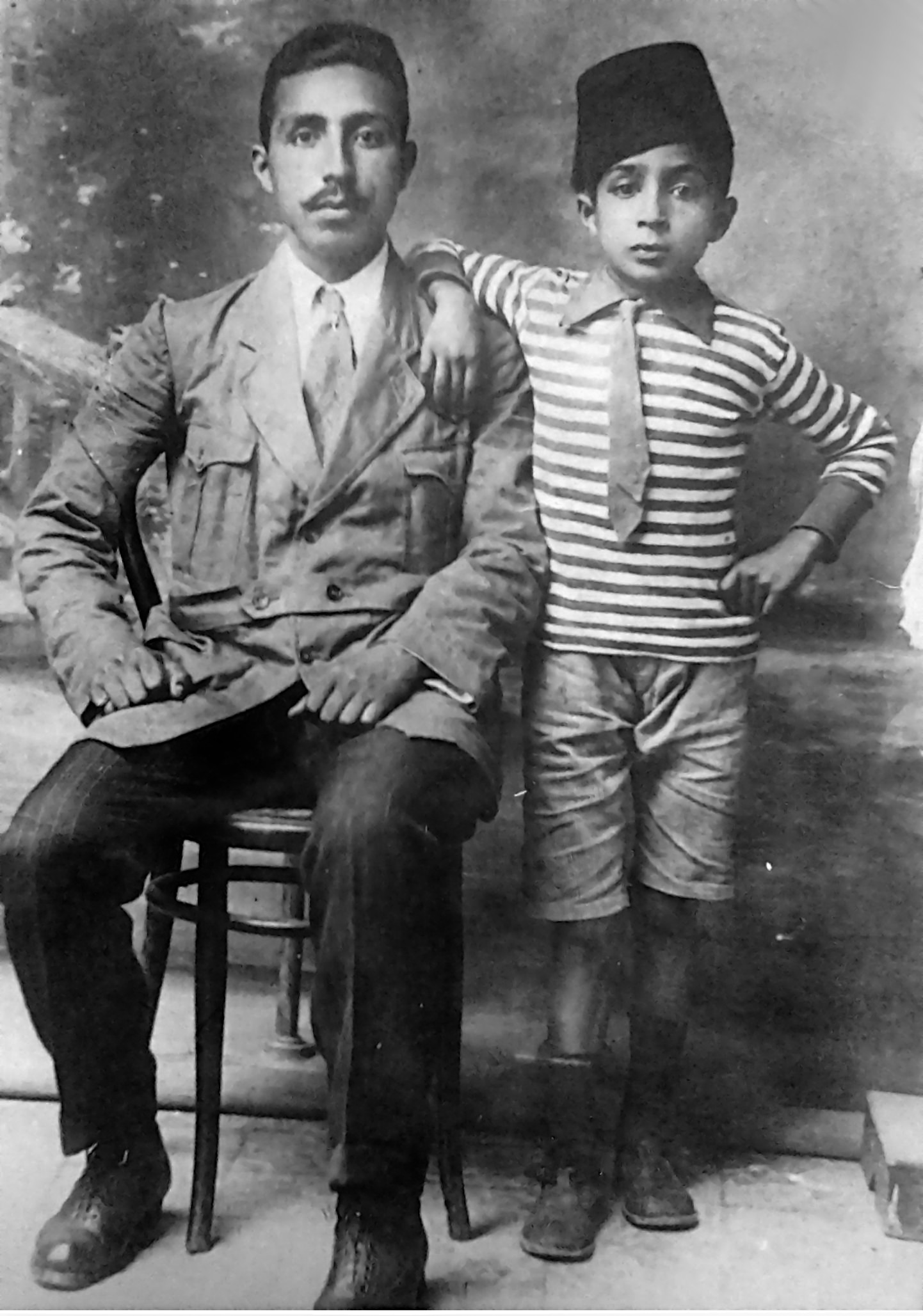 Habib Osman à dix ans (à droite) à côté de son frère ainé Mohamed (à gauche)